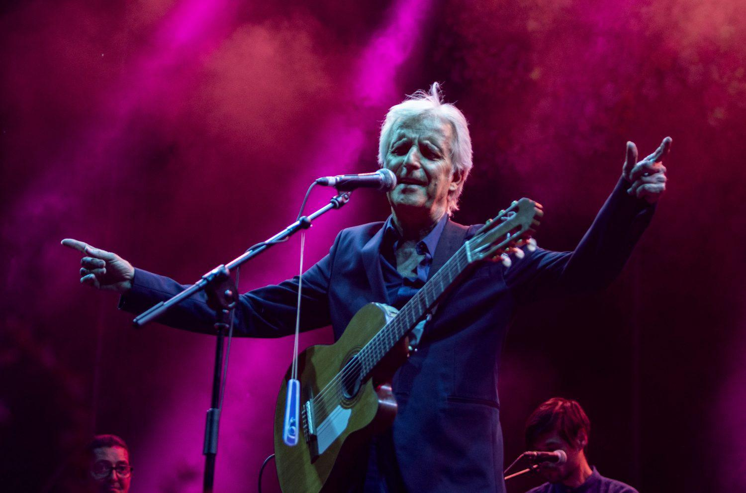 Los sonidos más rumberos se apoderaron ayer de la noche madrileña. Miles de personas abarrotaron los escenarios, a un lado y a otro del río.